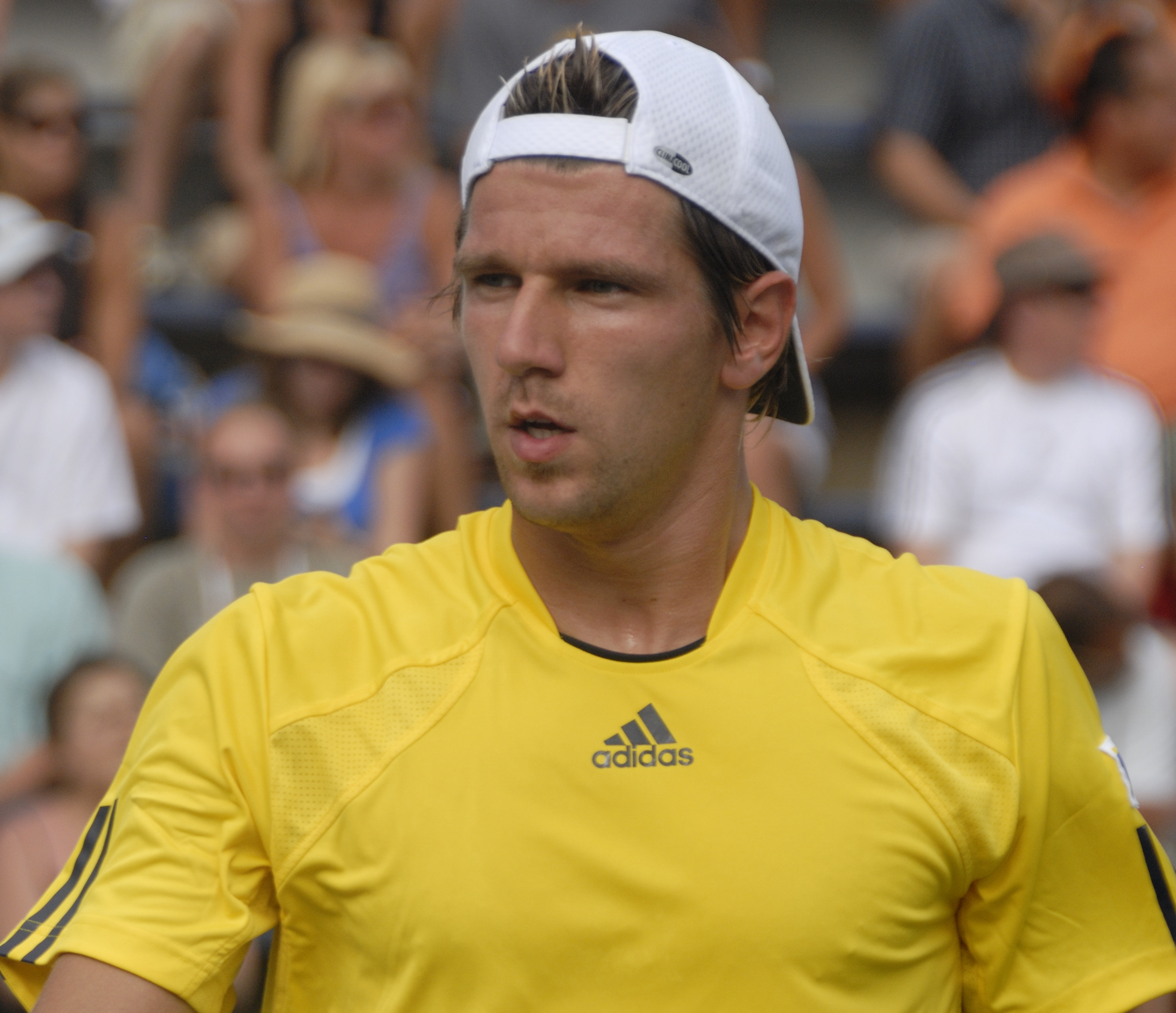 Jürgen Melzer at 2008 US Open